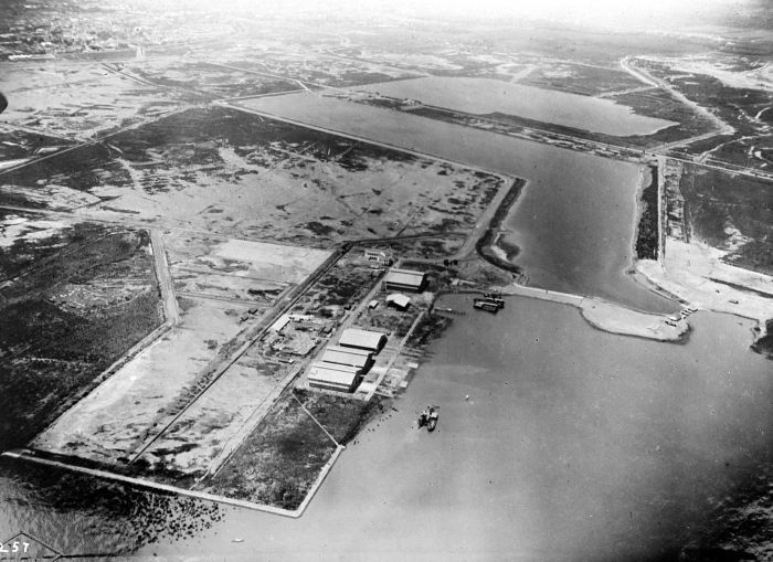 Repronegatief. Het Marine-vliegkamp te Soerabaja, Java